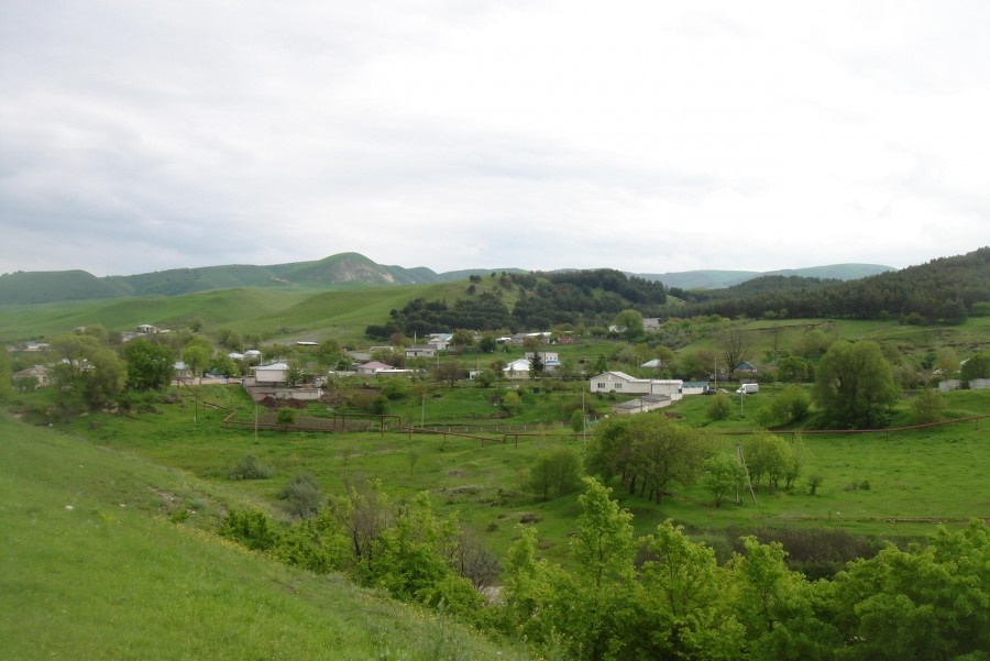 Вид на аул Инжич-Чукун